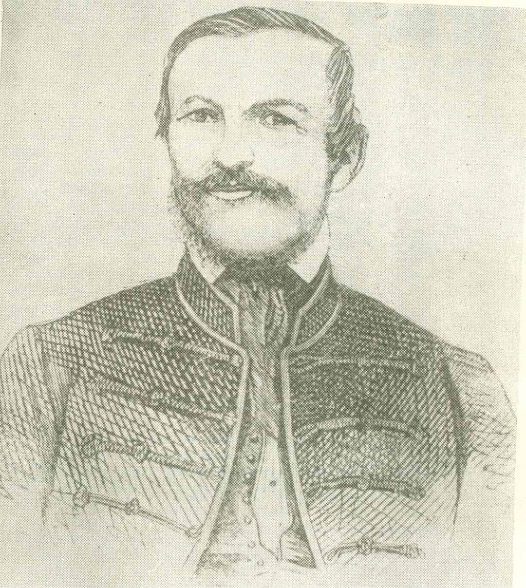 Montedegoi Albert Ferenc